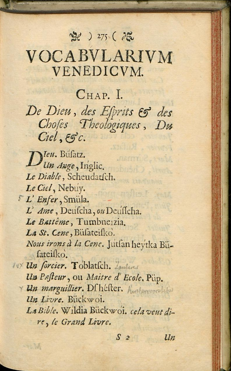 Первая страница Vocabularium Venedicum Христиана Хеннига, опубликованная в книге Historia studii etymologici linguae Germanicae hactenus impensi Иоганна фон Экхарта